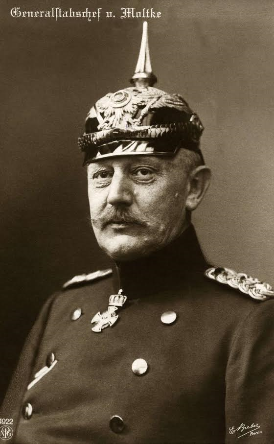 Helmuth von Moltke